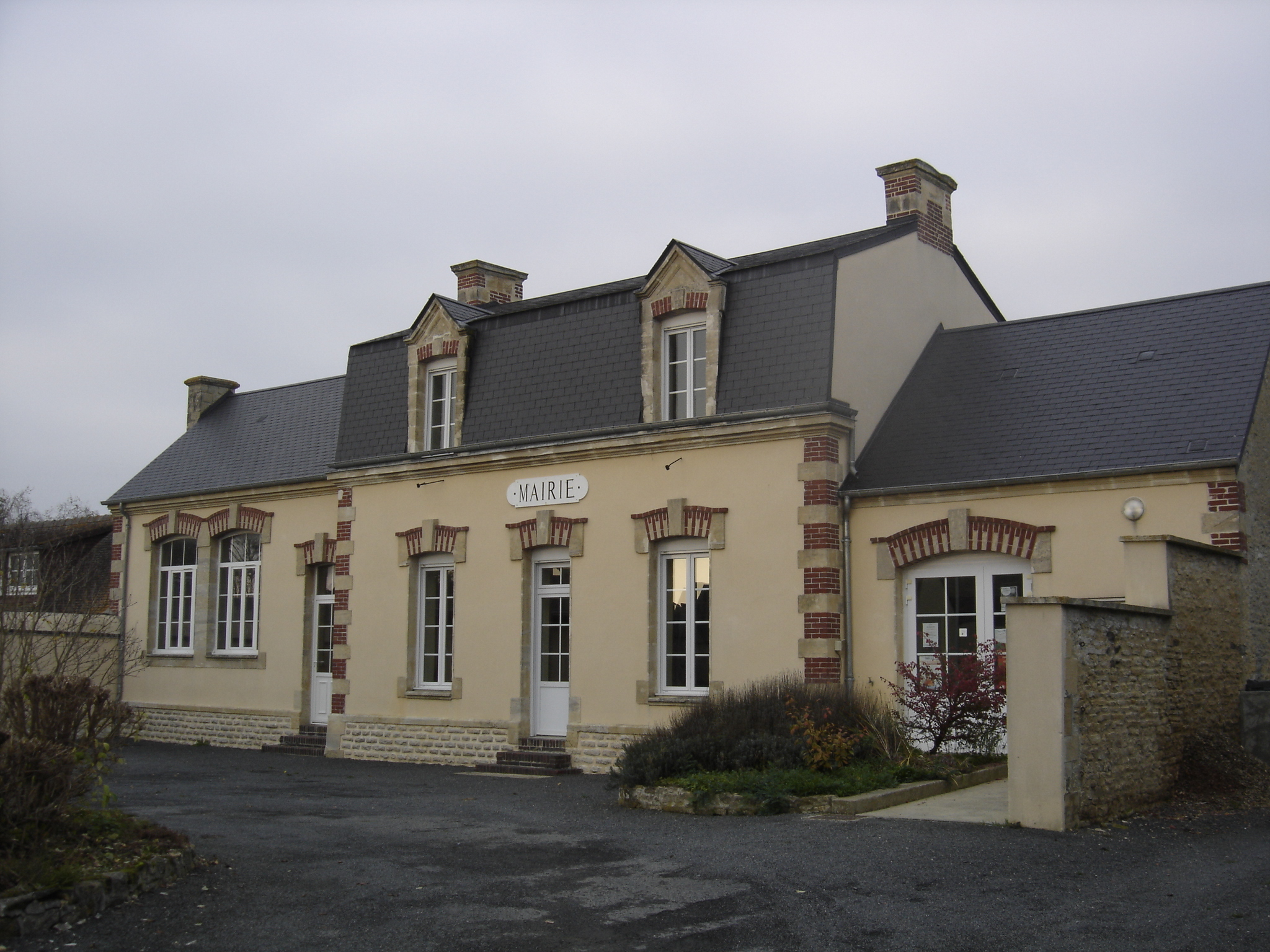 mairie de Magny-en-Bessin